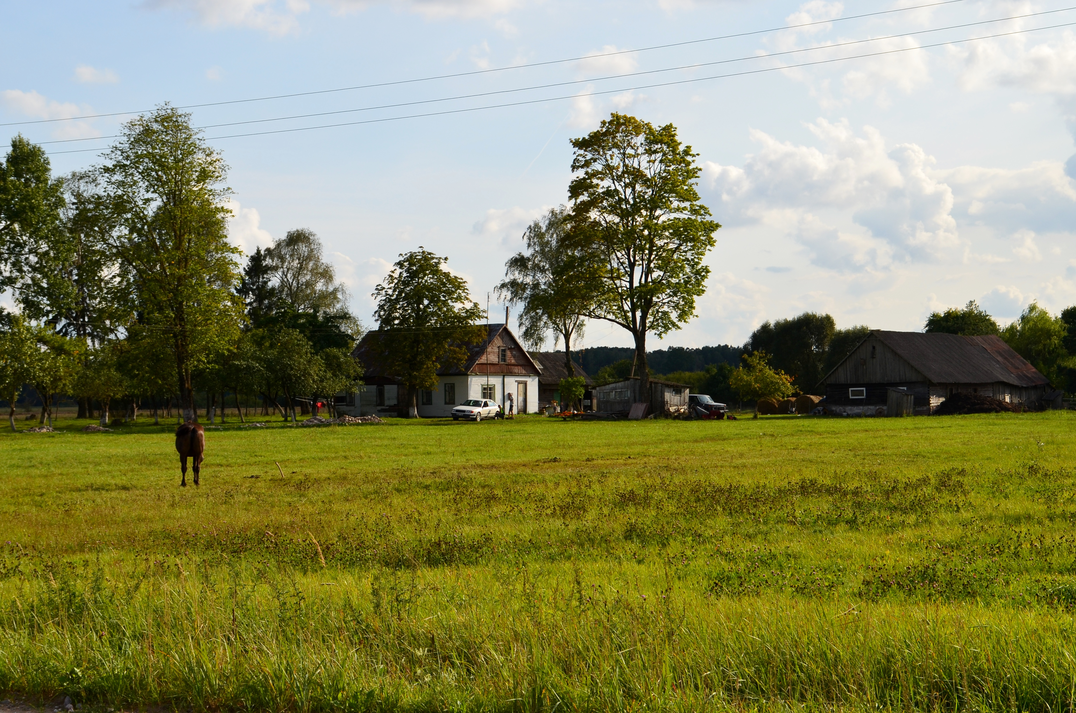 Balandiškis, Radviliškio raj.